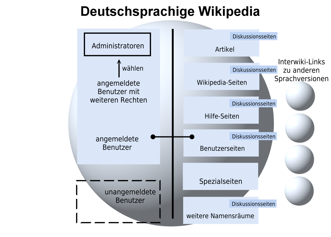 "Meine Beiträge": Organisation der deutschsprachigen Wikipedia